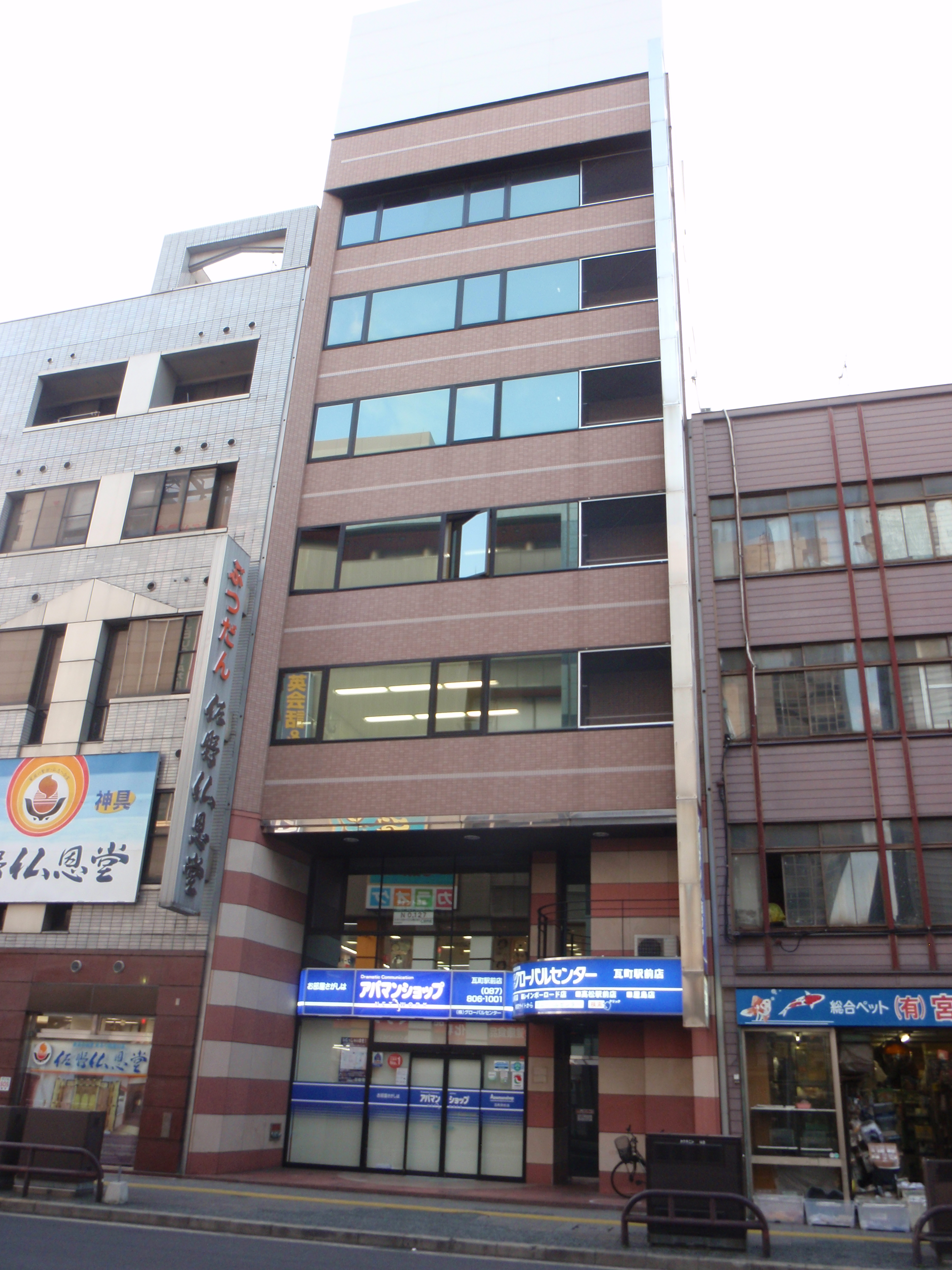 香川県高松市瓦町二丁目にあるオオタ理工ビル。サンライフ株式会社などが入居している。